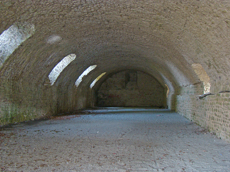 Keller der Ruine Forchtenberg, nach Zerstörung der Burg erweitert und zu verschiedenen Zwecken genutzt.